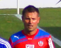 Erik Wahlstedt